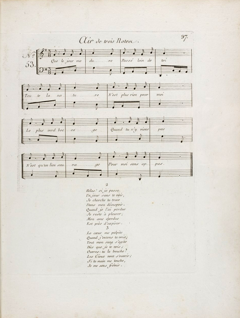 Extrait des s consolations des misères de ma vie, ou recueil d'airs romance/